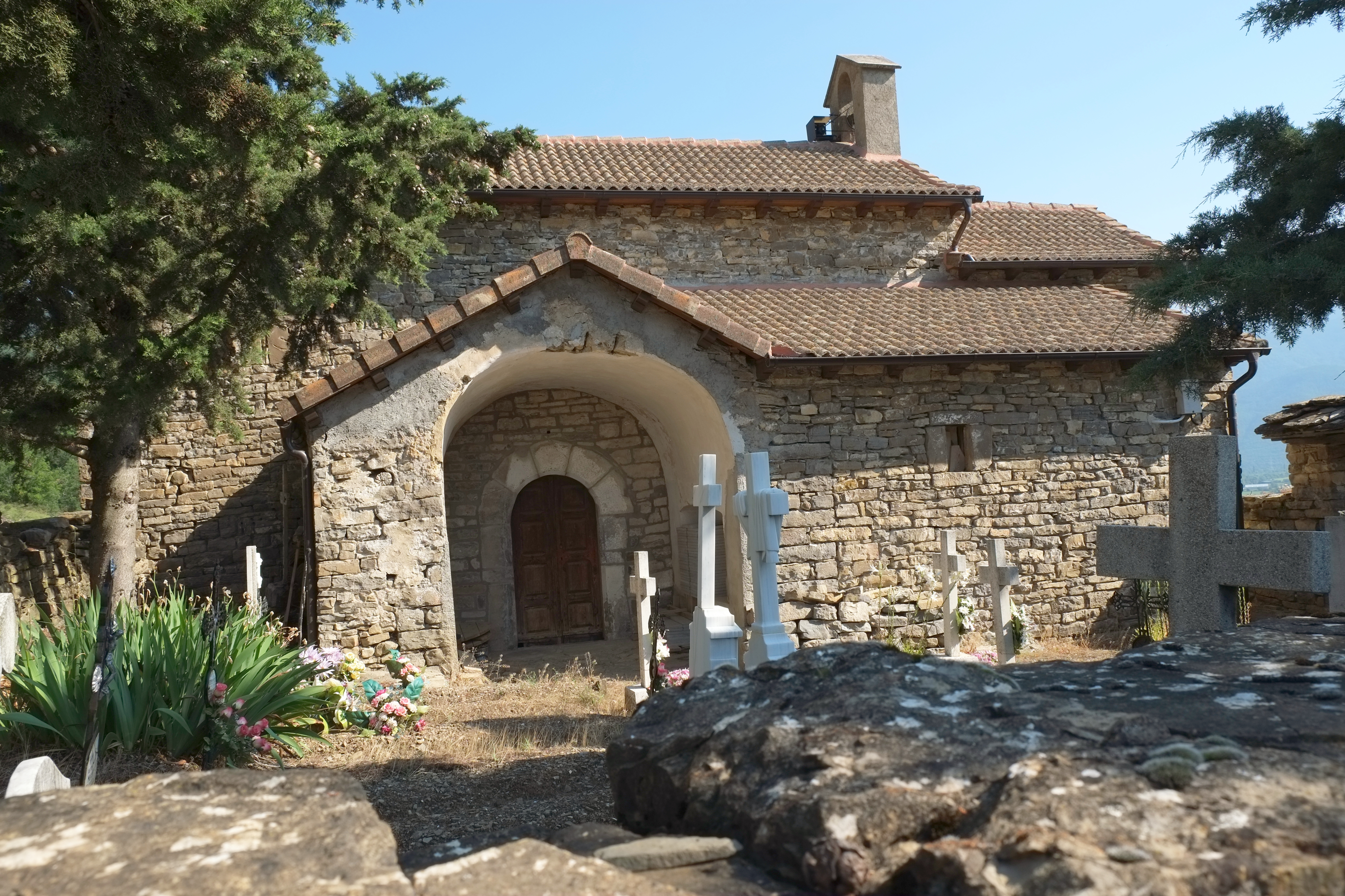 Kirche in Arguisal in der Provinz Huesca in Aragonien (Spanien)